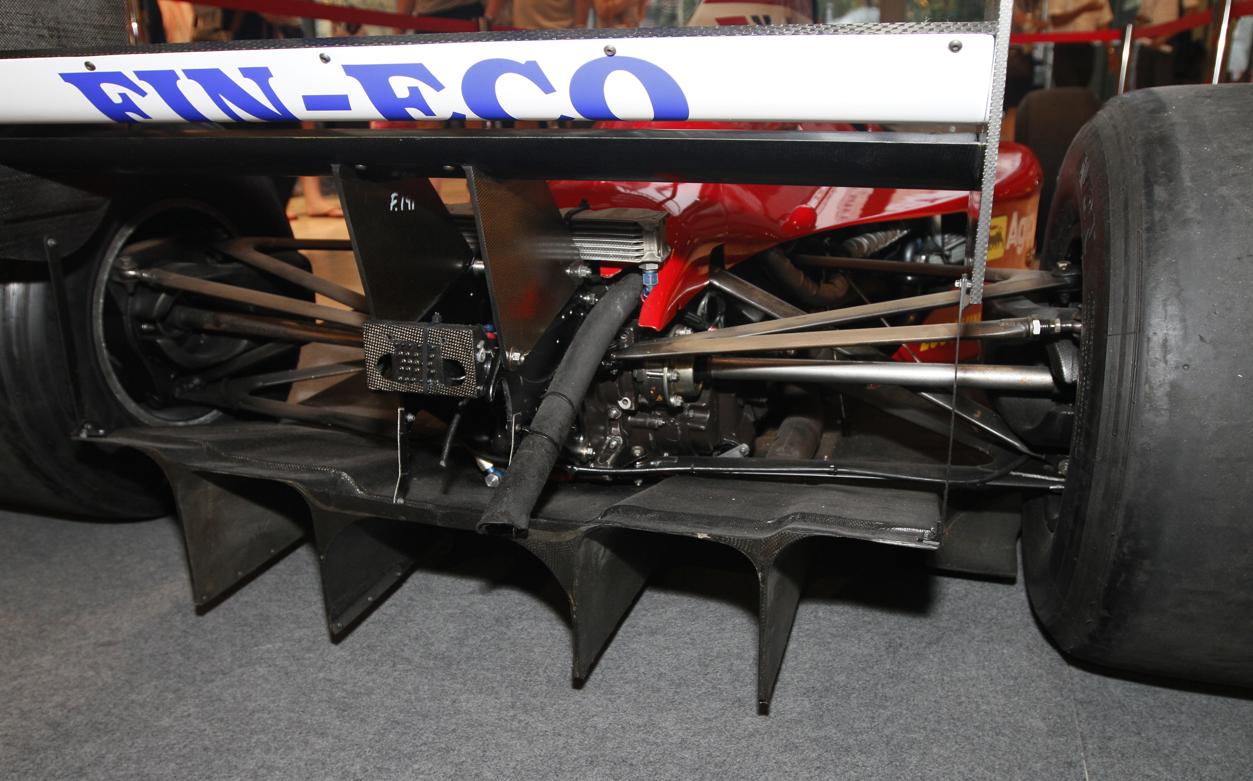 Pavilion Pit Stop 2010: Dallara 191's diffuser